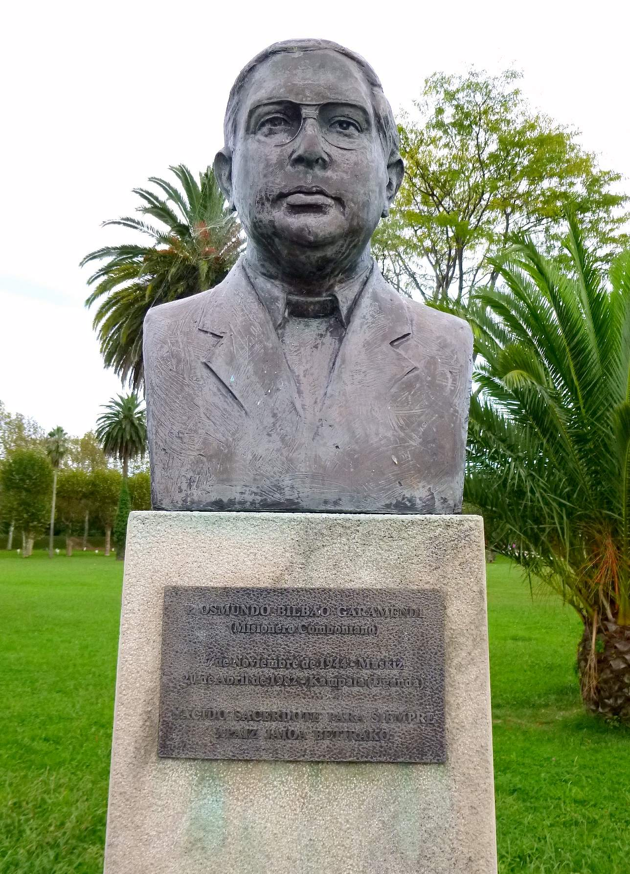 Muskiz (Vizcaya)